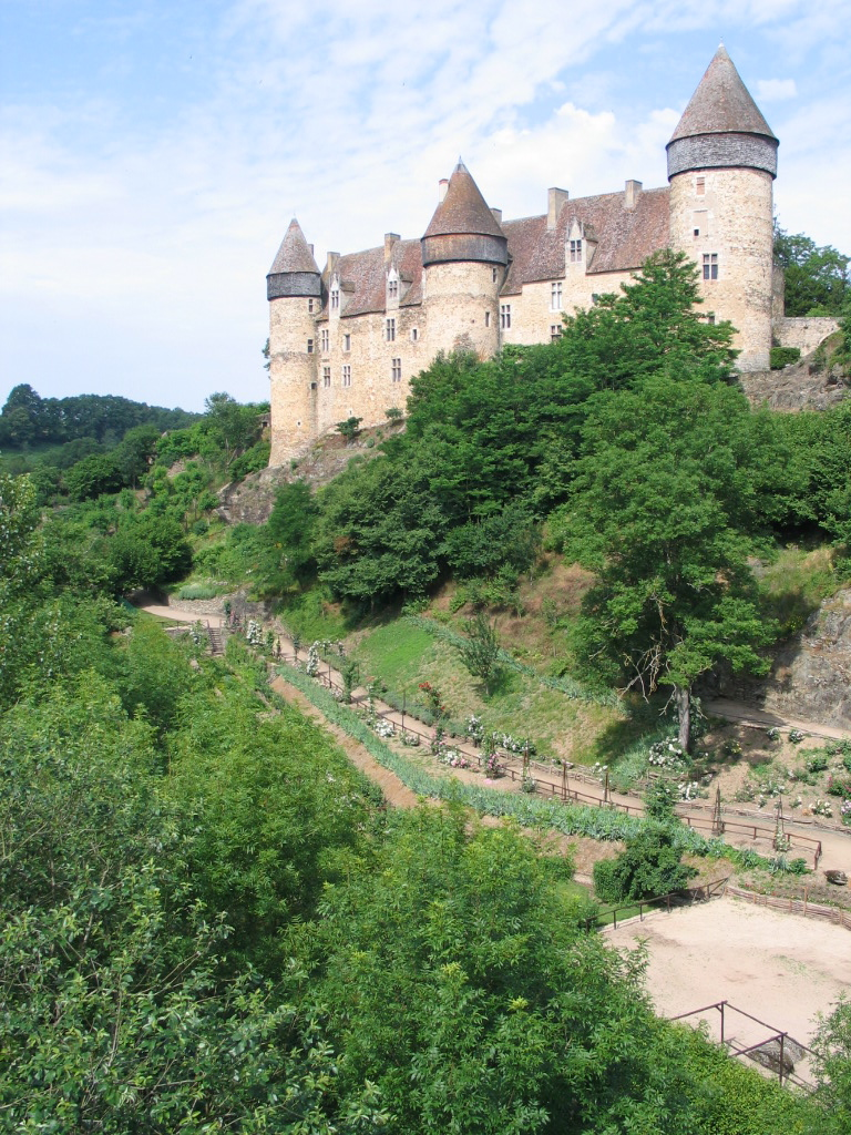 Château de Culan